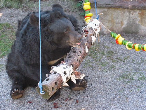 Kragenbärin Ali, Foto:Knöpfer/VIER PFOTEN